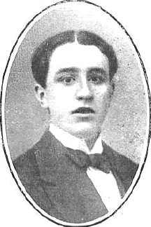 Fotografía del abogado y político español Pedro Armasa publicada en 1915 con motivo de haber pronunciado un discurso en la inauguración del nuevo local de la Juventud Republicana de Málaga